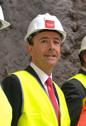 Inicio de las obras de prolongación de la línea 11 de metro al barrio de la Fortuna (10 de junio de 2008). En la foto, Rafael Pérez-Montoya, alcalde de Leganés, Esperanza Aguirre, Manuel Lamela y Florentino Pérez.